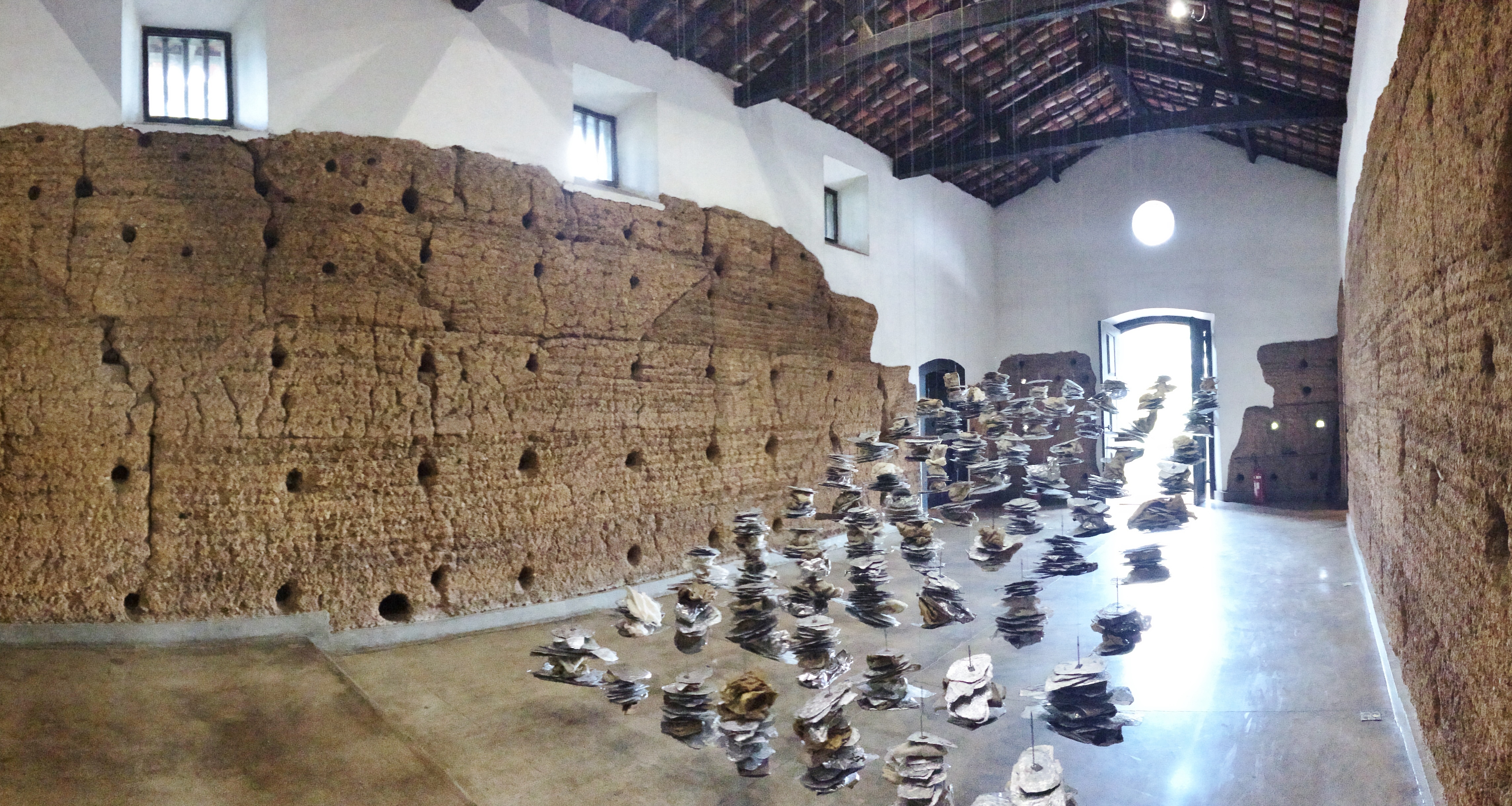 Sala principal da Capela do Morumbi, em São Paulo (SP), Brasil.